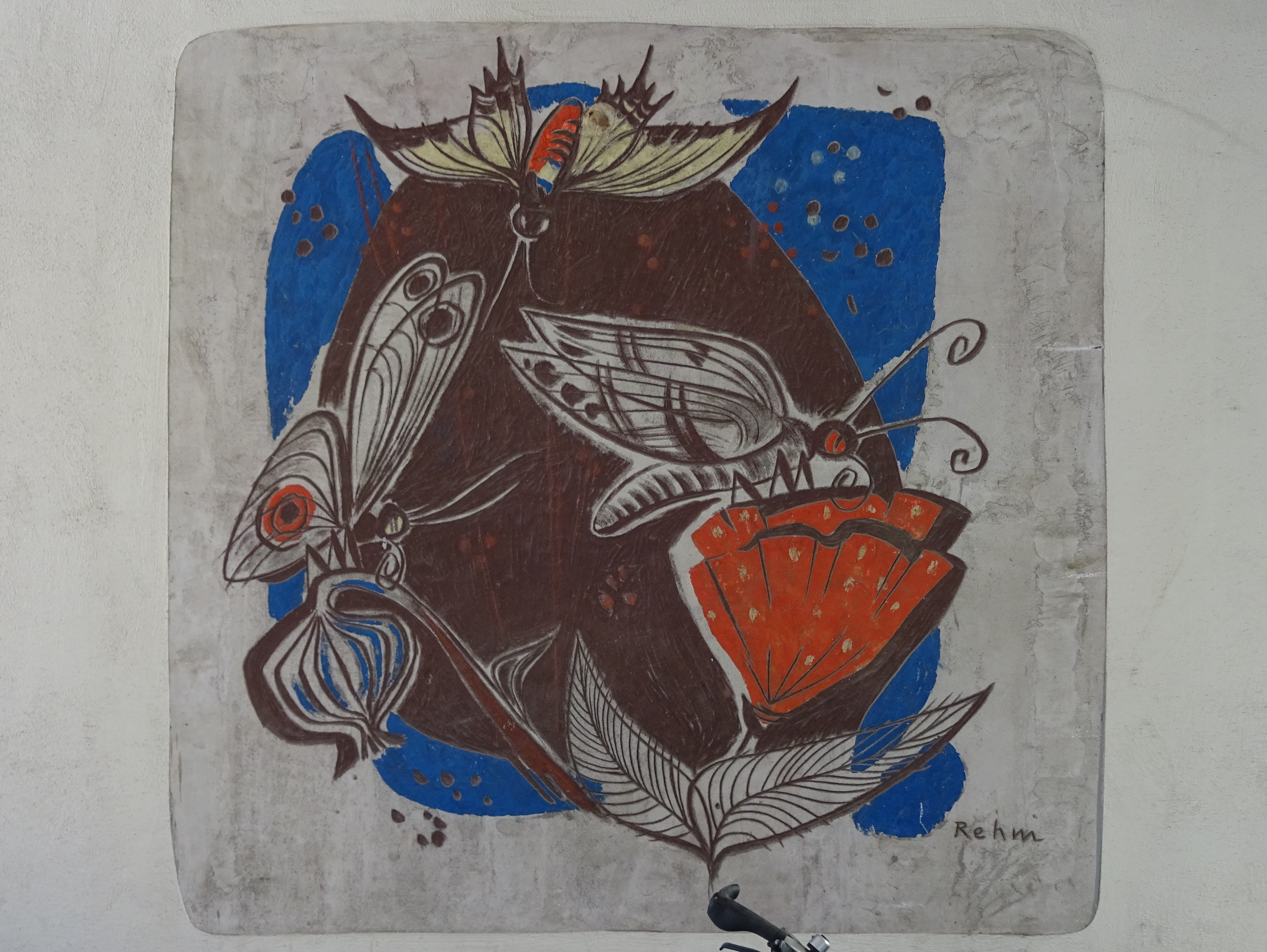 Maria-Theresien-Straße 49a, Durchgang von der Maria-Theresien-Straße zum Landhausplatz: Wandbild Schmetterlinge von Helmut Rehm, 1956 This media shows the remarkable cultural object in the Austrian state of Tyrol listed by the Tyrolean Art Cadastre with the ID 135009. (on tirisMaps, on tirisdienste.at, pdf, more images on Commons)